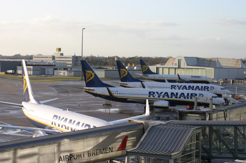 "Ryanair" B-737